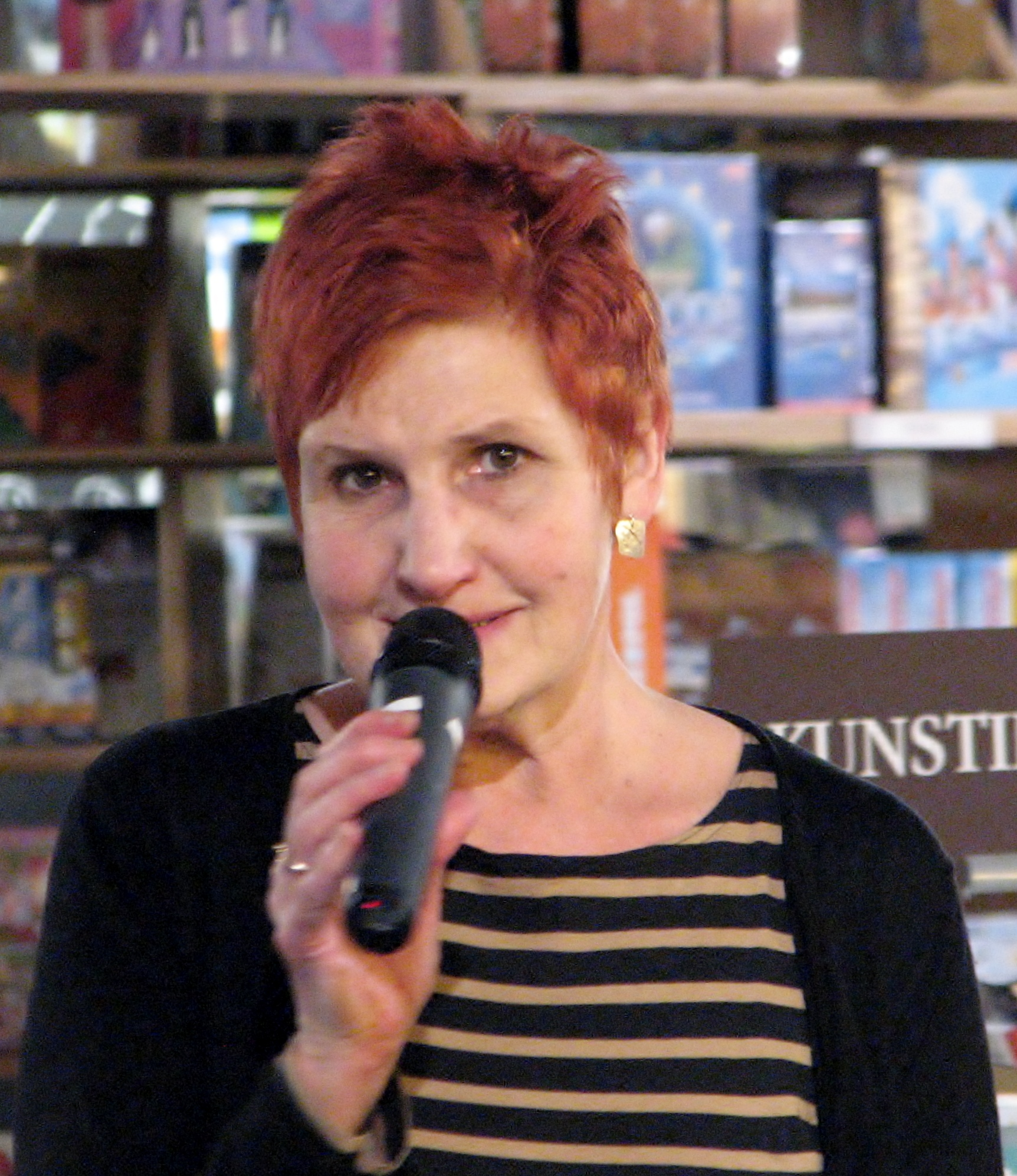 Krista Kaer Andrei Ivanovi raamatu "Harbini ööliblikad" esitlusel Viru keskuse Rahva Raamatus